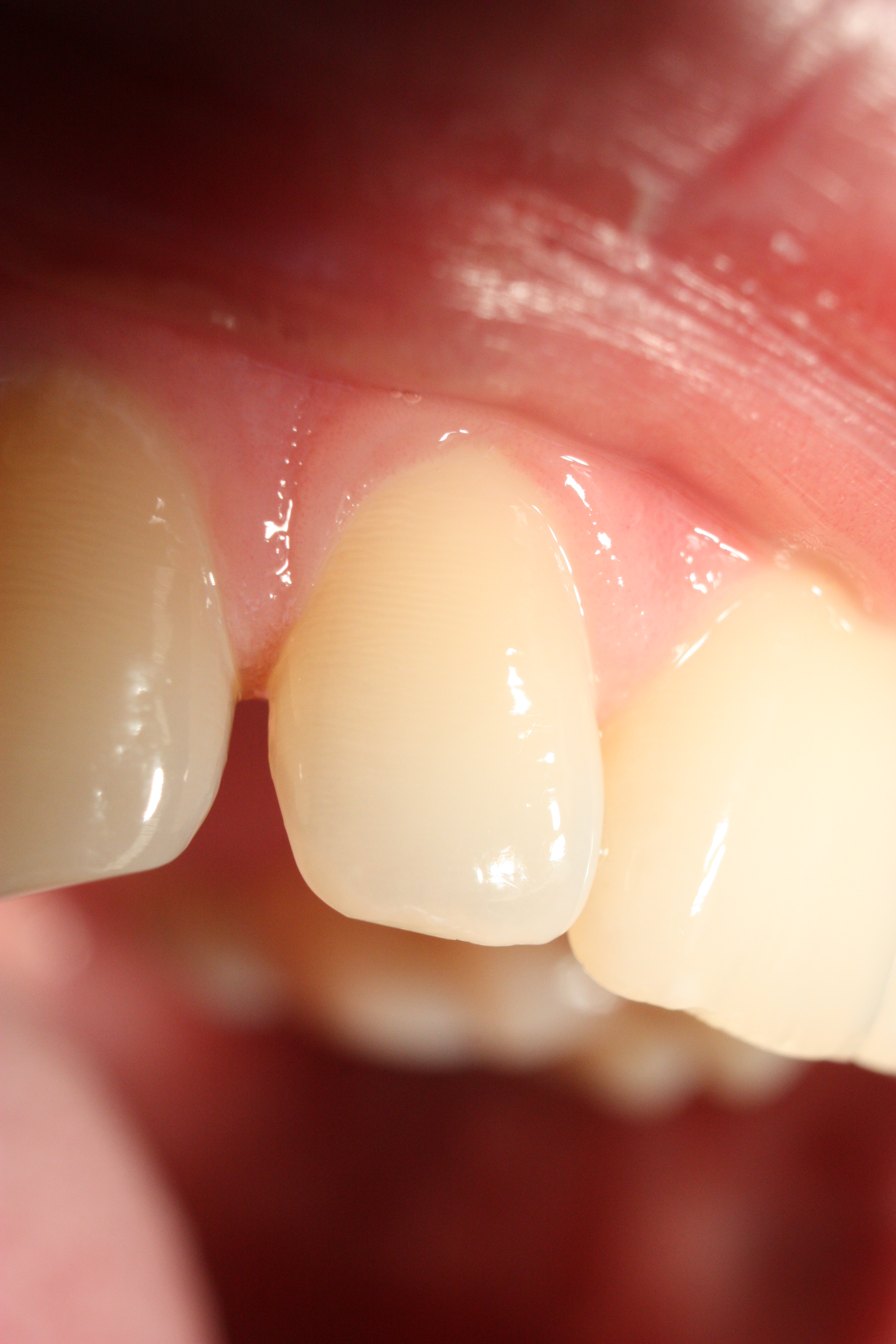 Oberkiefer Frontzähne (linker oberer seitlicher Schneidezahn, Zahn 12)